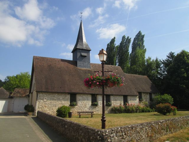 Eglise de Fontaine sous Jouy